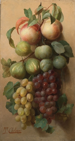 Natura Morta con Frutta - Olio su Tela di Tito chelazzi (1834-1892)